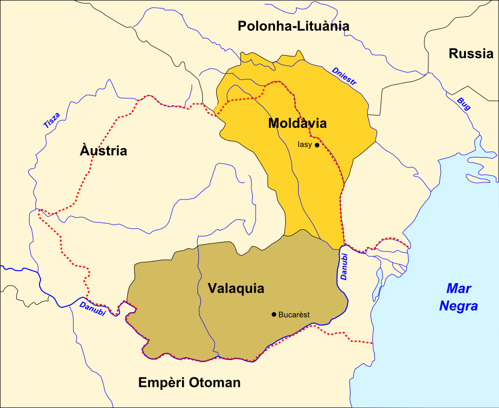 Principats de Valaquia e de Moldàvia vèrs 1750.